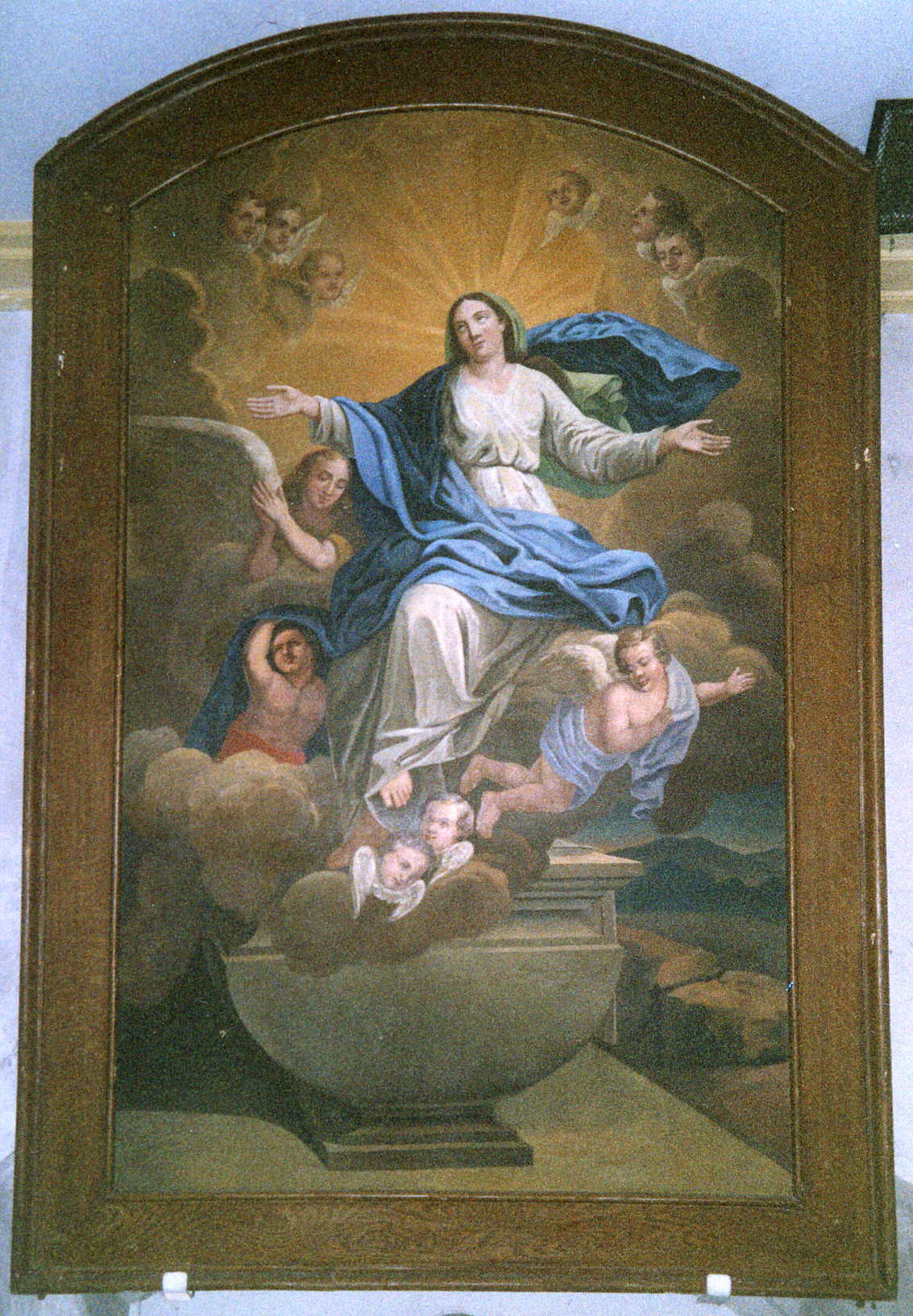 Notre Dame en son Assomption dans l'église de crévéchamps par Catherine Froment 2006